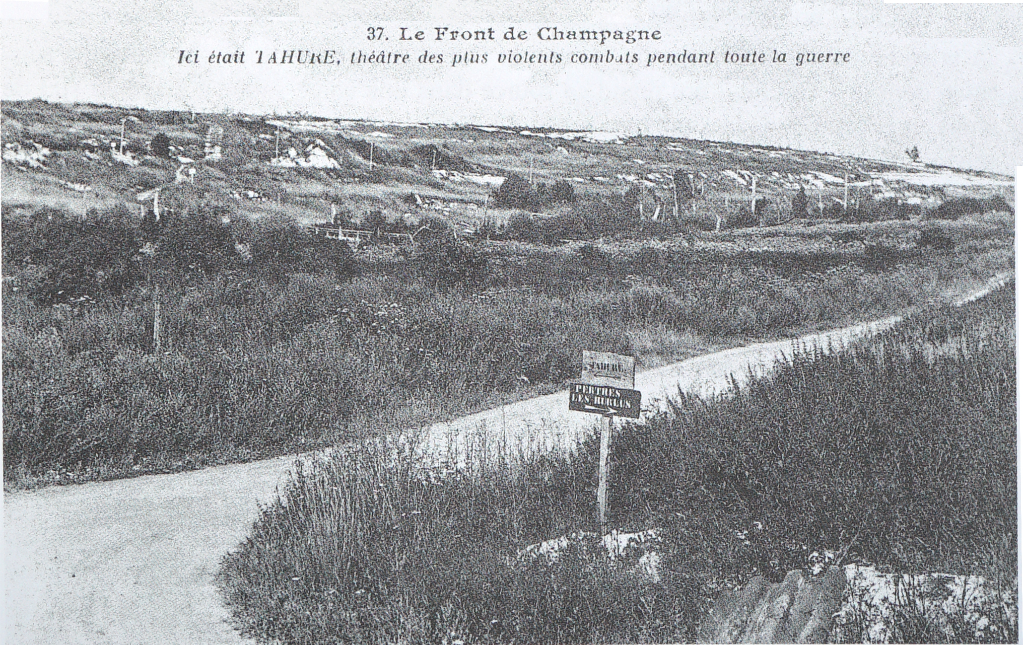 Vue de Tahure après la Première Guerre mondiale.